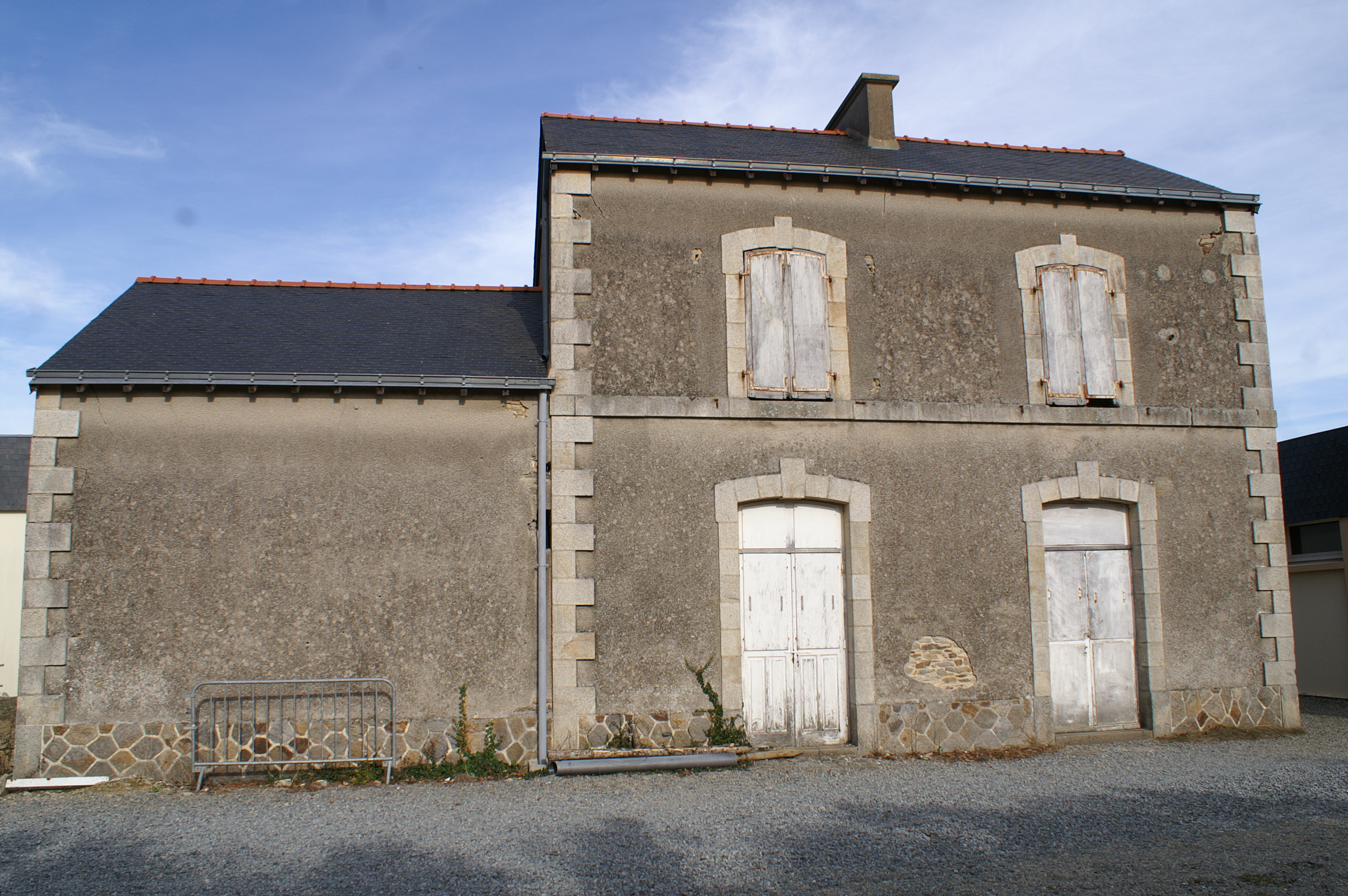 L'ancien bâtiment de la gare de Surzur.